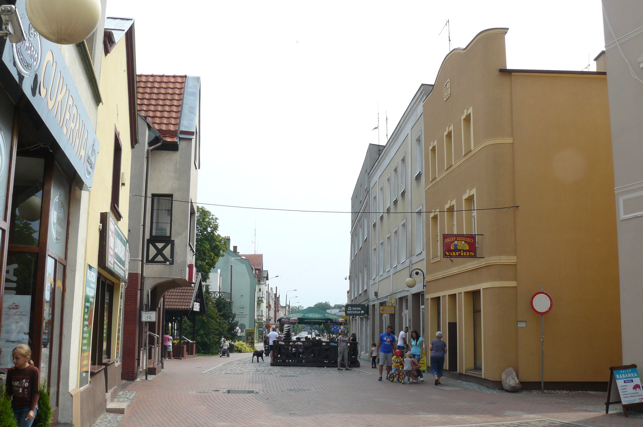 Centrum Tucholi.